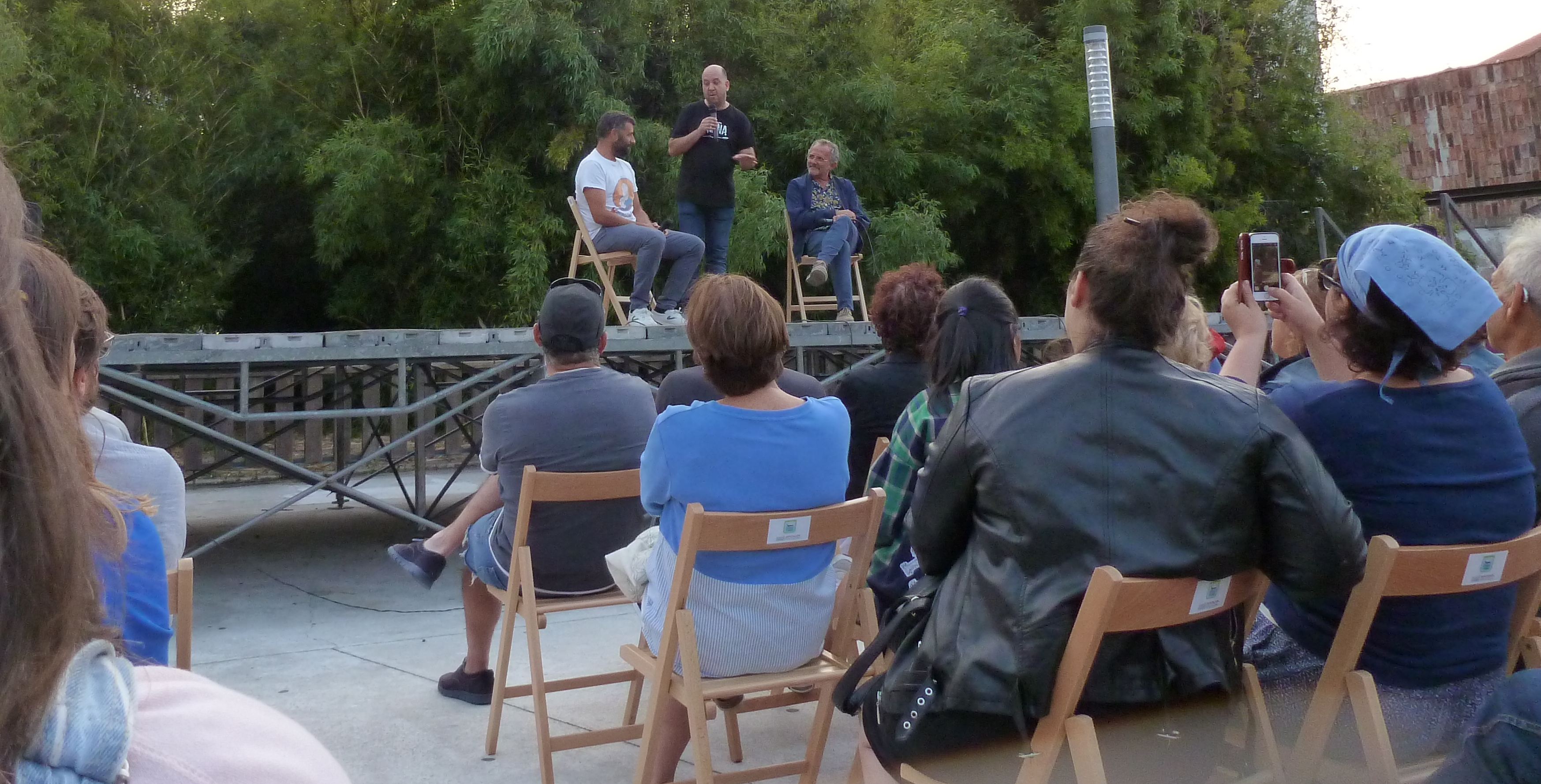 Presentación de "Fariña" en Bueu (16/08/18) con Fernando Miranda e Morris